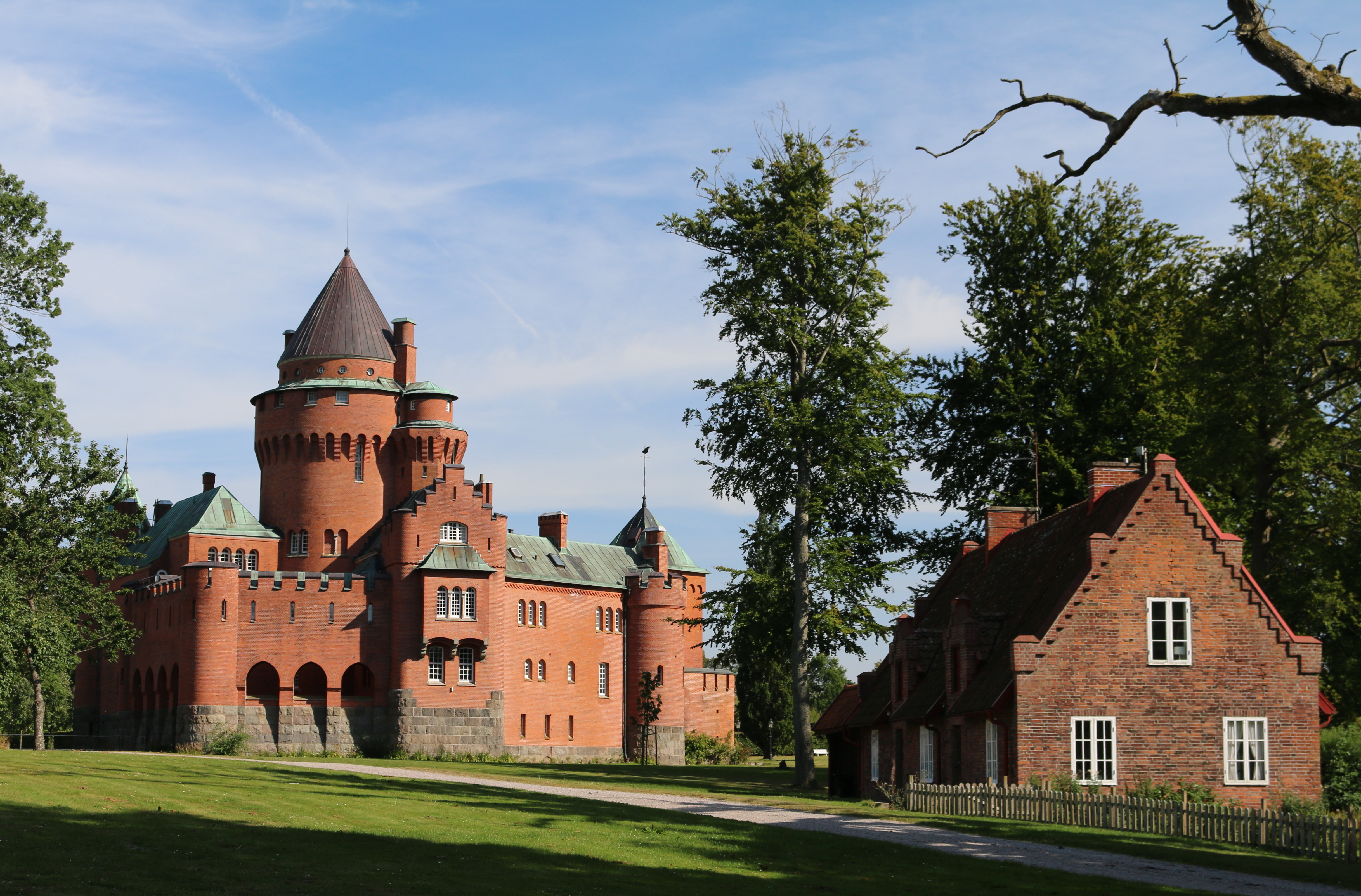 Hjularöds slott augusti 2015